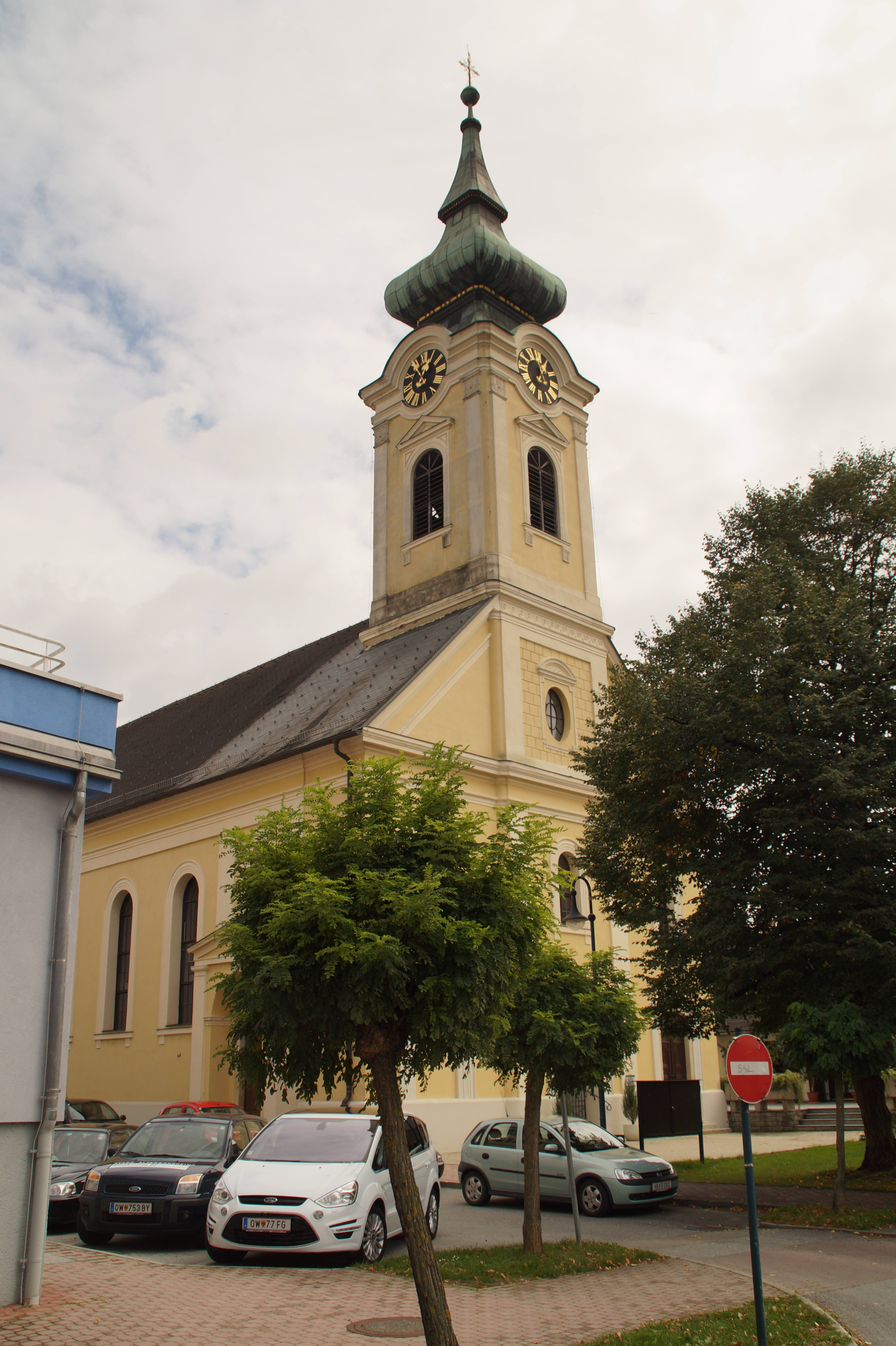 Evang. Pfarrkirche A.B. Pinkafeld